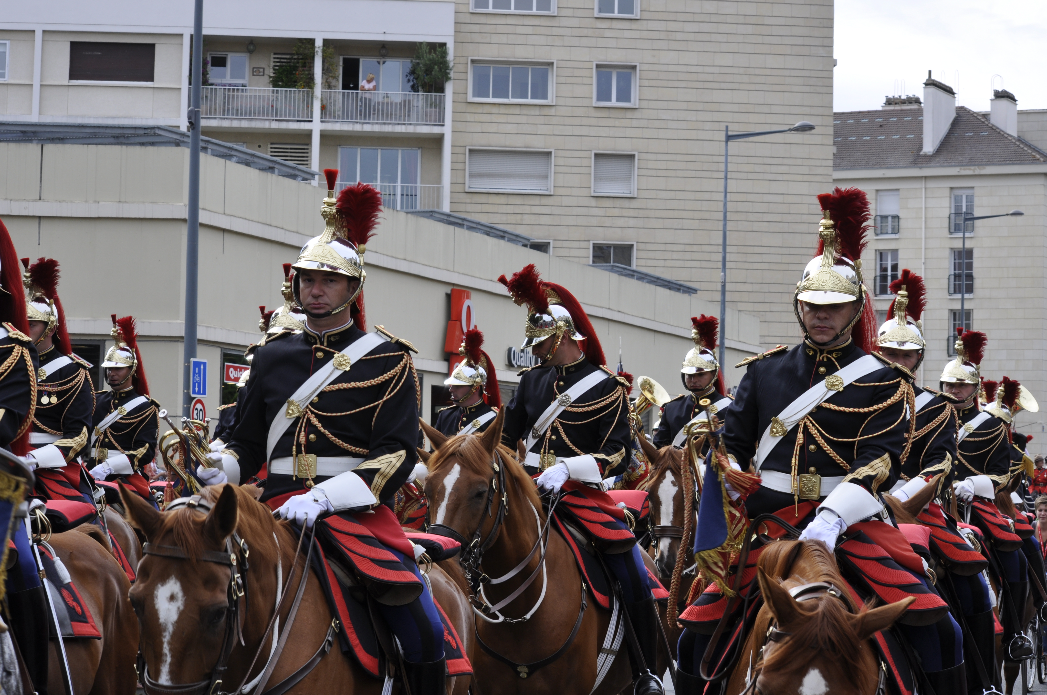 Garde républicaine dans les rues de Caen pour les JEM 2014